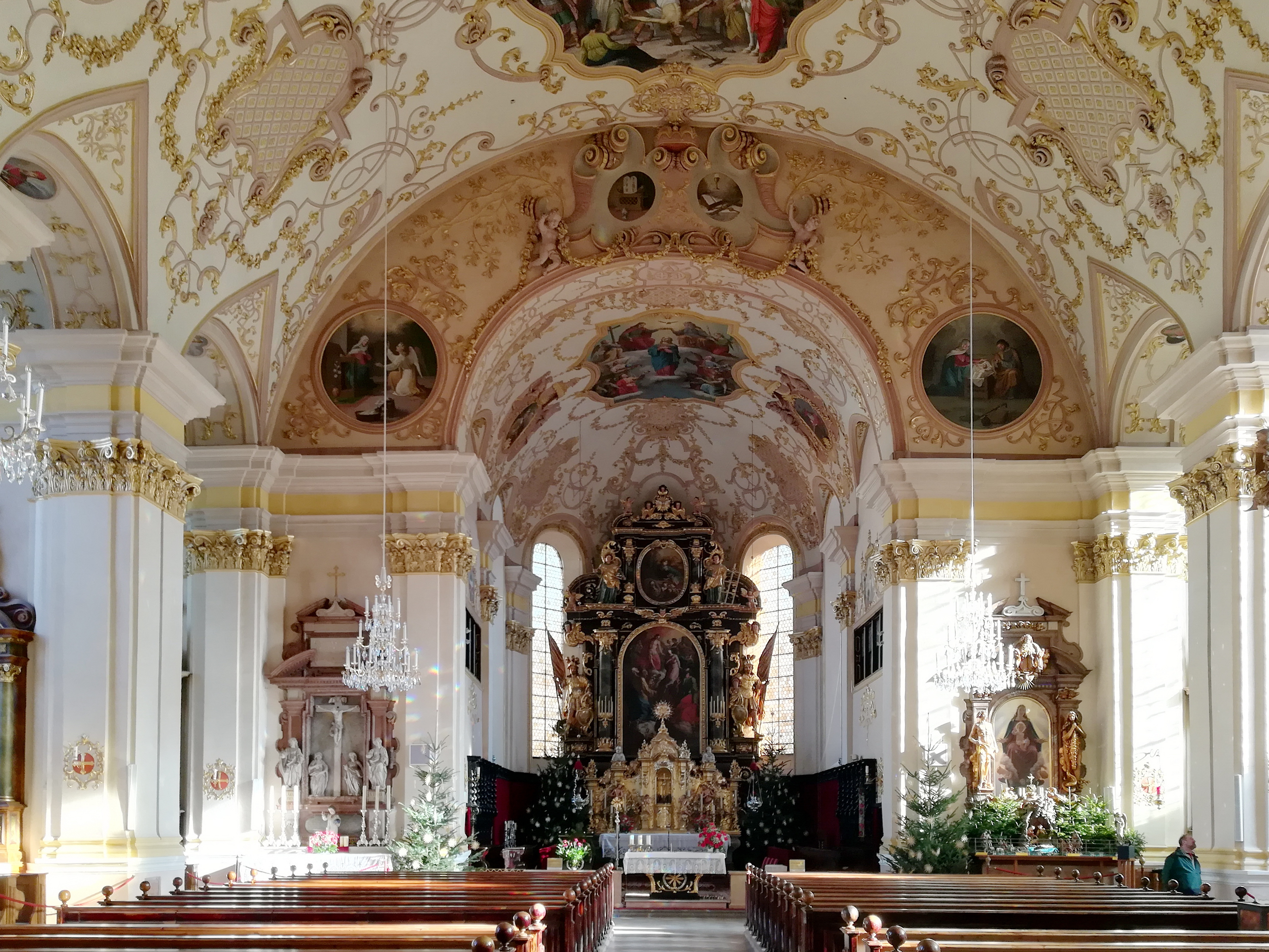 Das barocke Langhaus zeigt sich als weiträumiges einschiffiges fünfjochiges von einer weitgespannten gedrückten Tonne überwölbt.